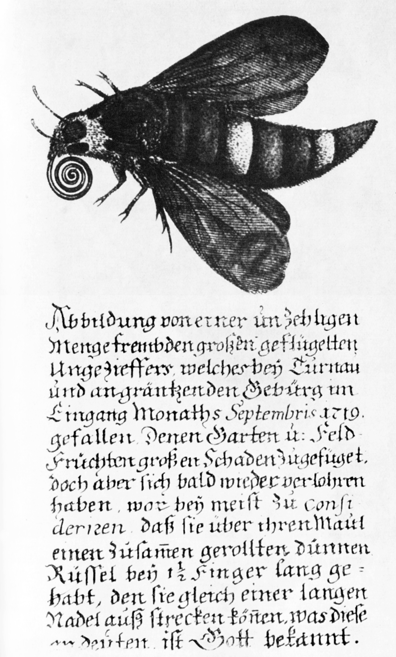 Abbildung von einer unzehligen Menge frembden großen geflügelten Ungeziffers, welches bey Turnau und angräntzenden Gebürg im Eingang Monaths Septembris 1719 gefallen. Denen Garten u. Feldfrüchten großen Schaden zugefügt doch aber sich bald wieder verlohren haben, war bey meist confiderizen, daß sie über ihren Maul einen zusamen gerollten dünnen Rüssel bey 1 1/2 Finger lang gehabt, den sie gleich einer langen Nadel auß strecken könen, was diese zu deuten ist Gott bekannt. - Here mass appearance of Agrius convolvuli is mentioned in 1719 close to Turnau.